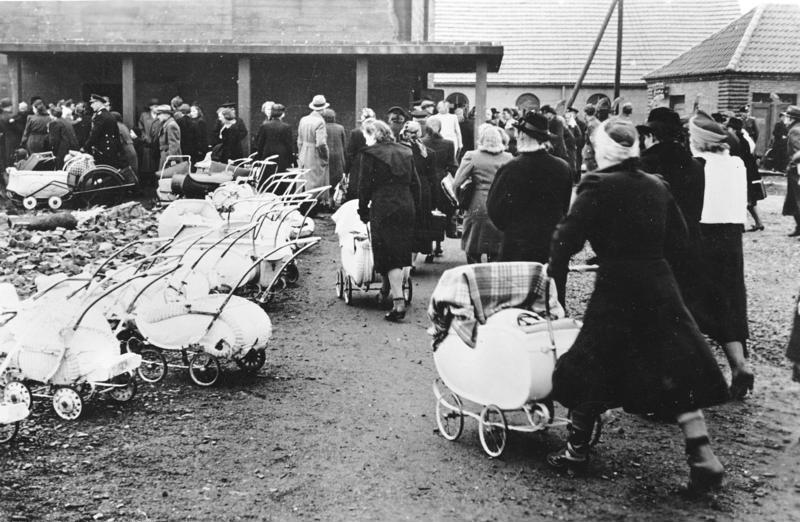 Wenn der Feind einfliegt Der Alarm wurde rechtzeitig ausgelöst. Ruhig und gelassen begeben sich die Einwohner der Stadt in den Bunker. Bis zum wahrscheinlichen Überfliegen der Stadt dauert es noch seine Zeit, so dass jeder noch den Schutzraum erreichen kann. Foto: Kriegsberichter Andres